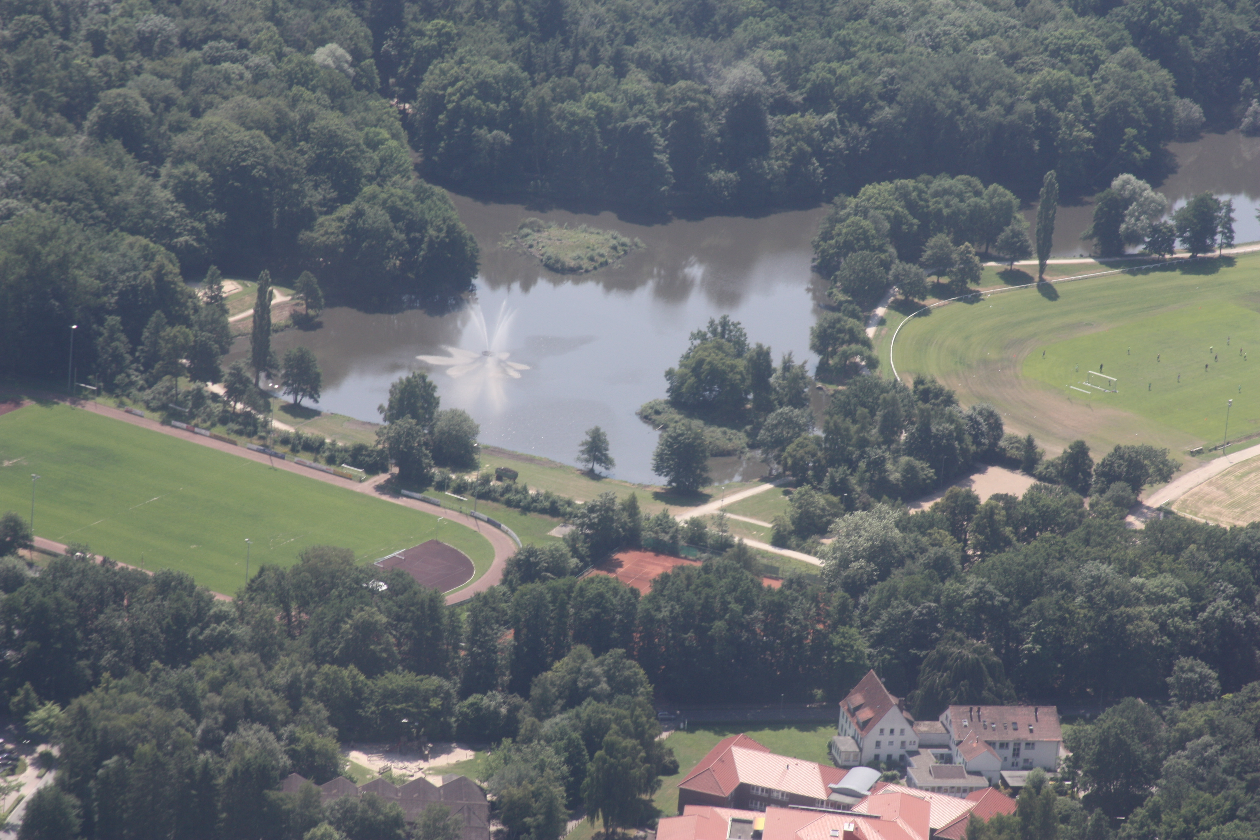 Flug über Rastede; von Varel kommend nach Oldenburg; Flughöhe 500 m = 1500 ft; Juli 2010